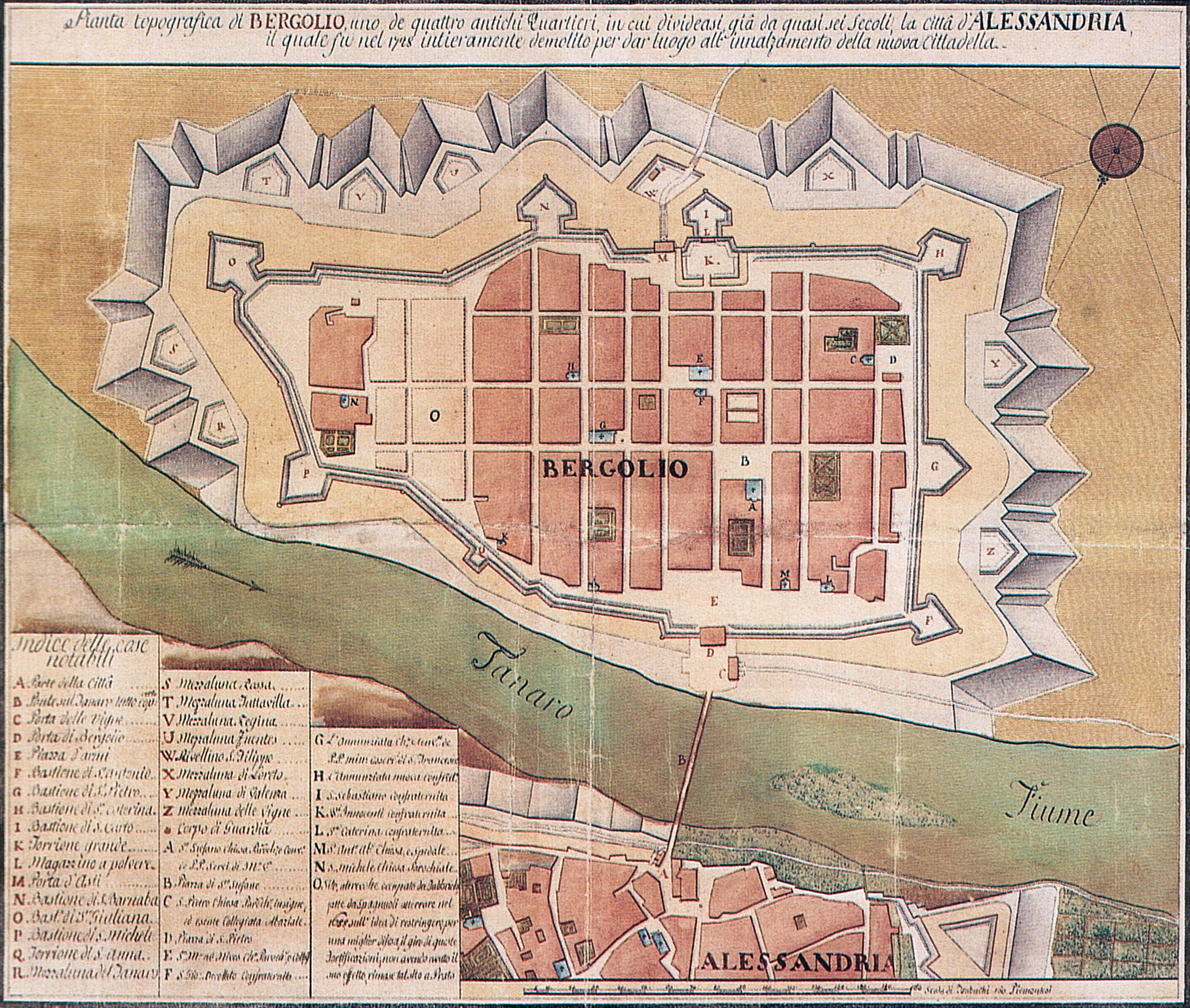 Pianta topografica di Bergoglio (metà secolo XVIII)